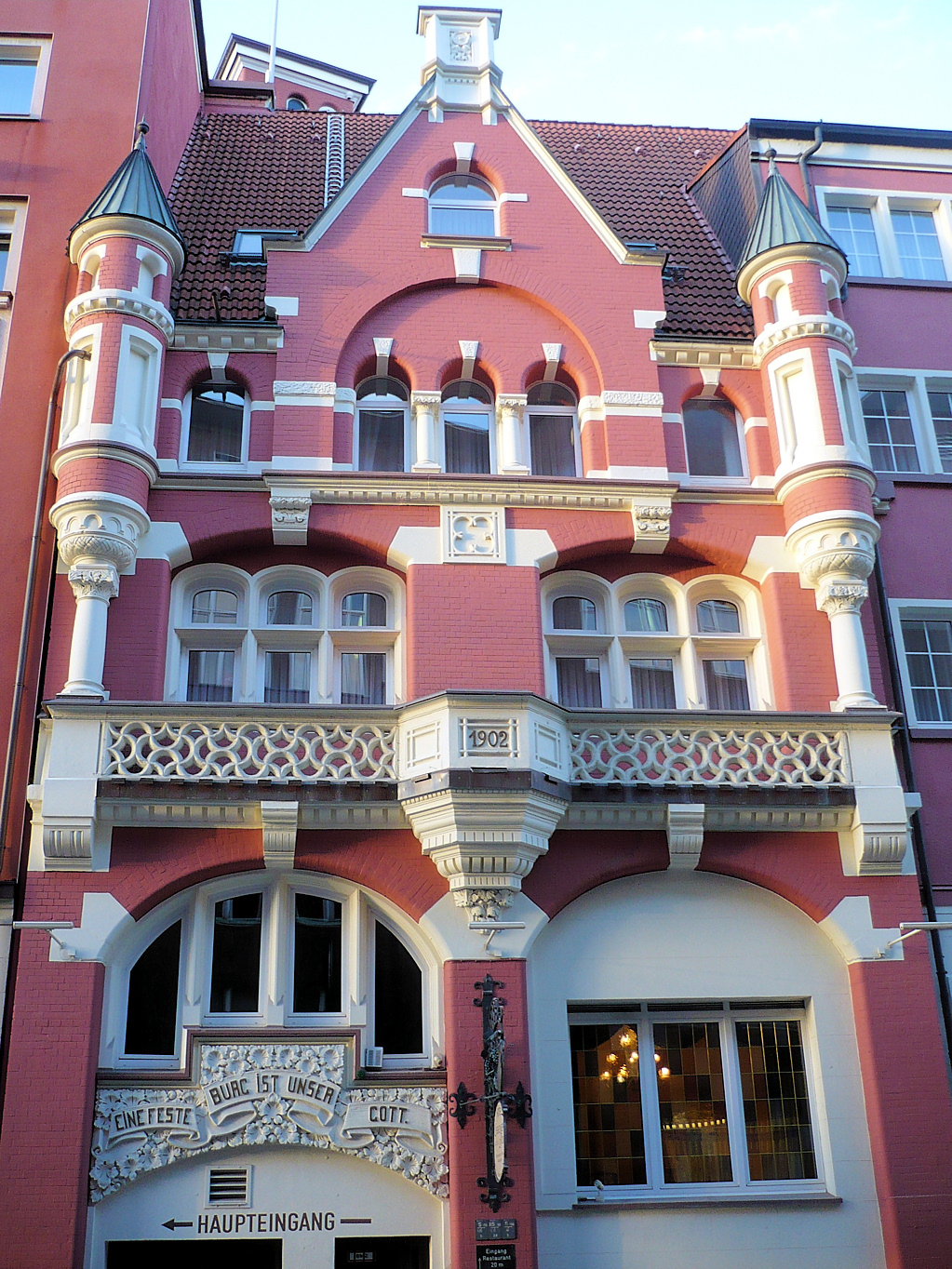 Hotel Essener Hof im Essener Zentrum, südl. Seitenflügel